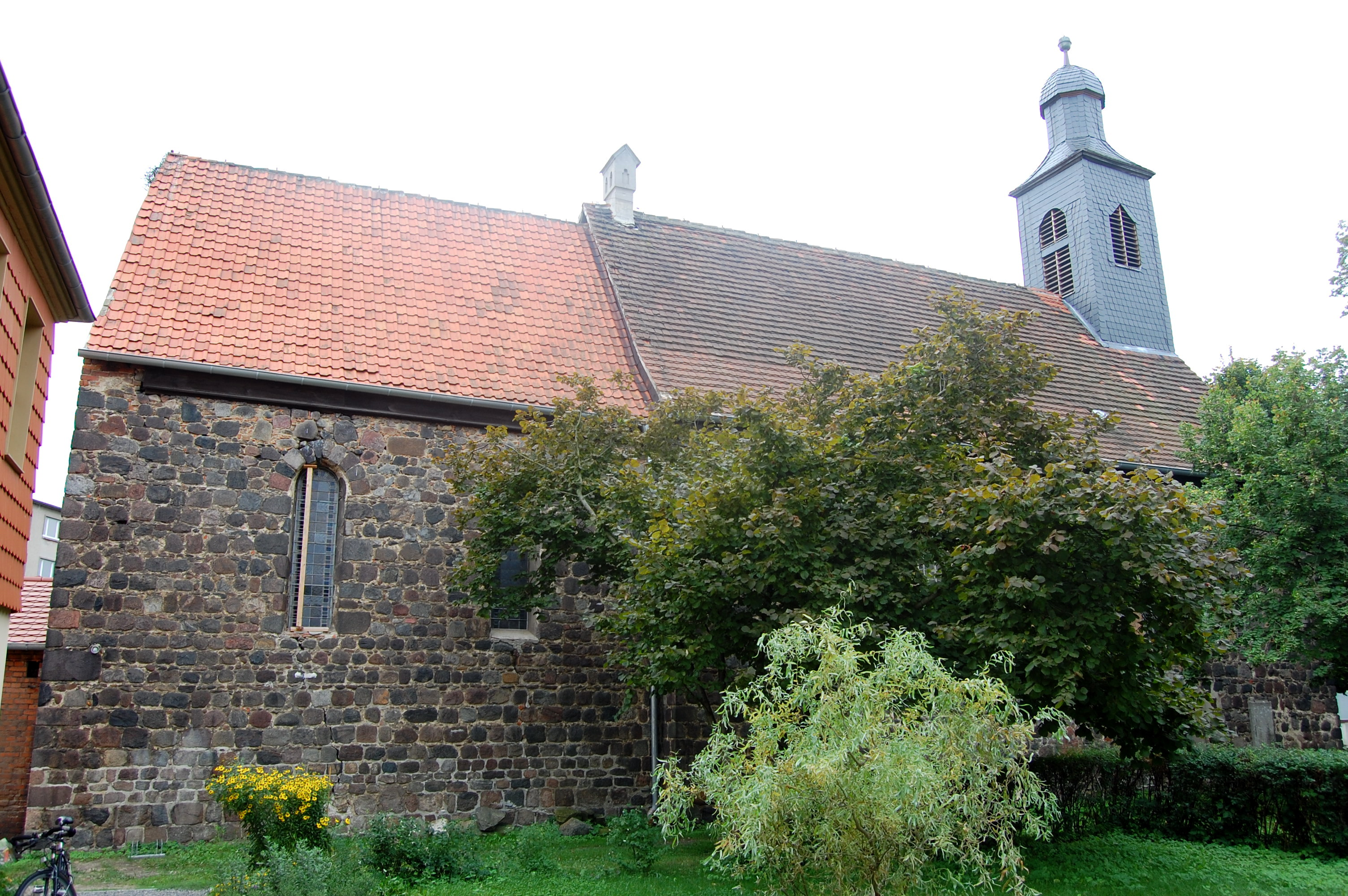 Sankt-Petri-Kirche in Burg (bei Magdeburg)